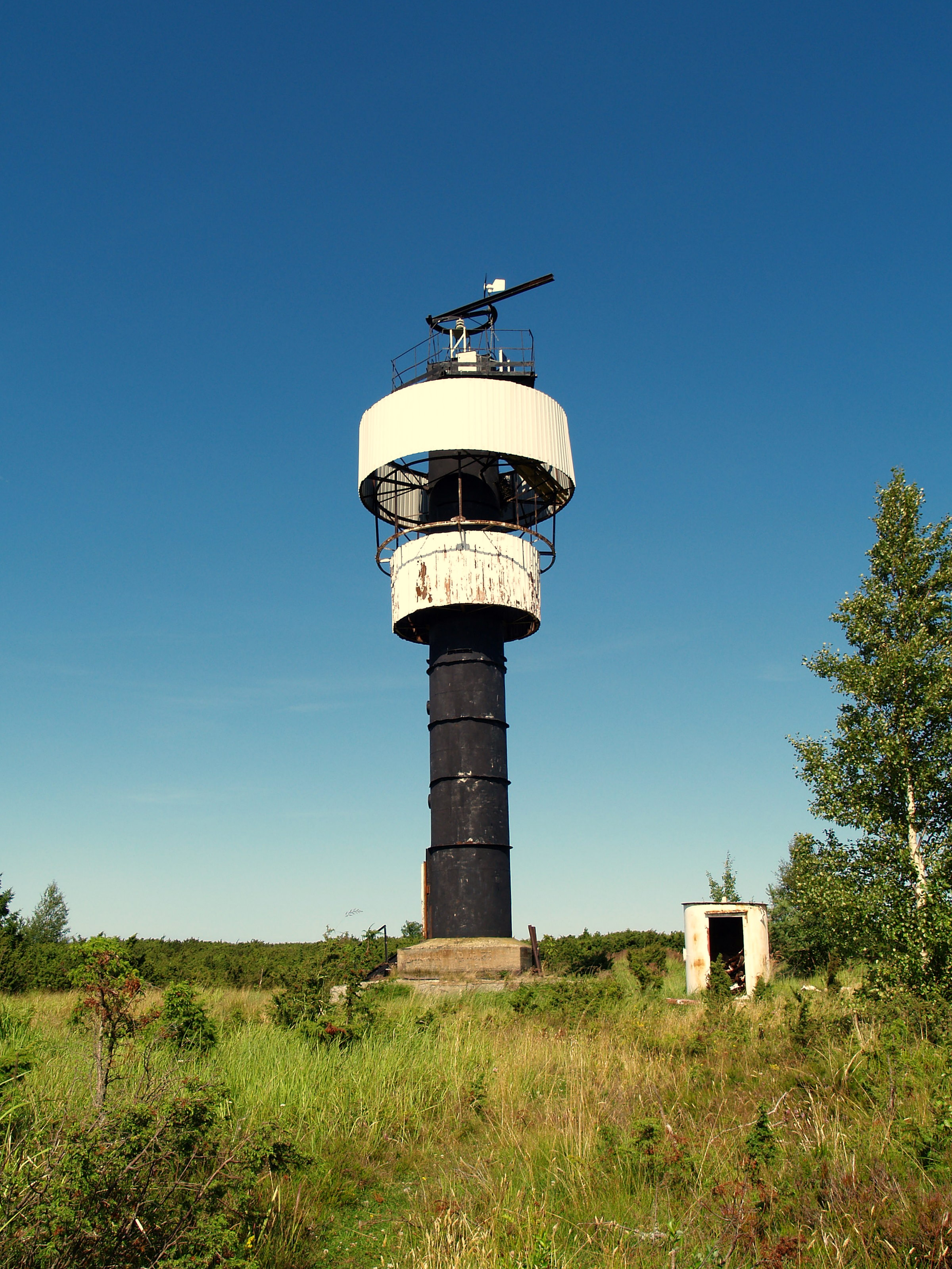 Aksi tulepaak